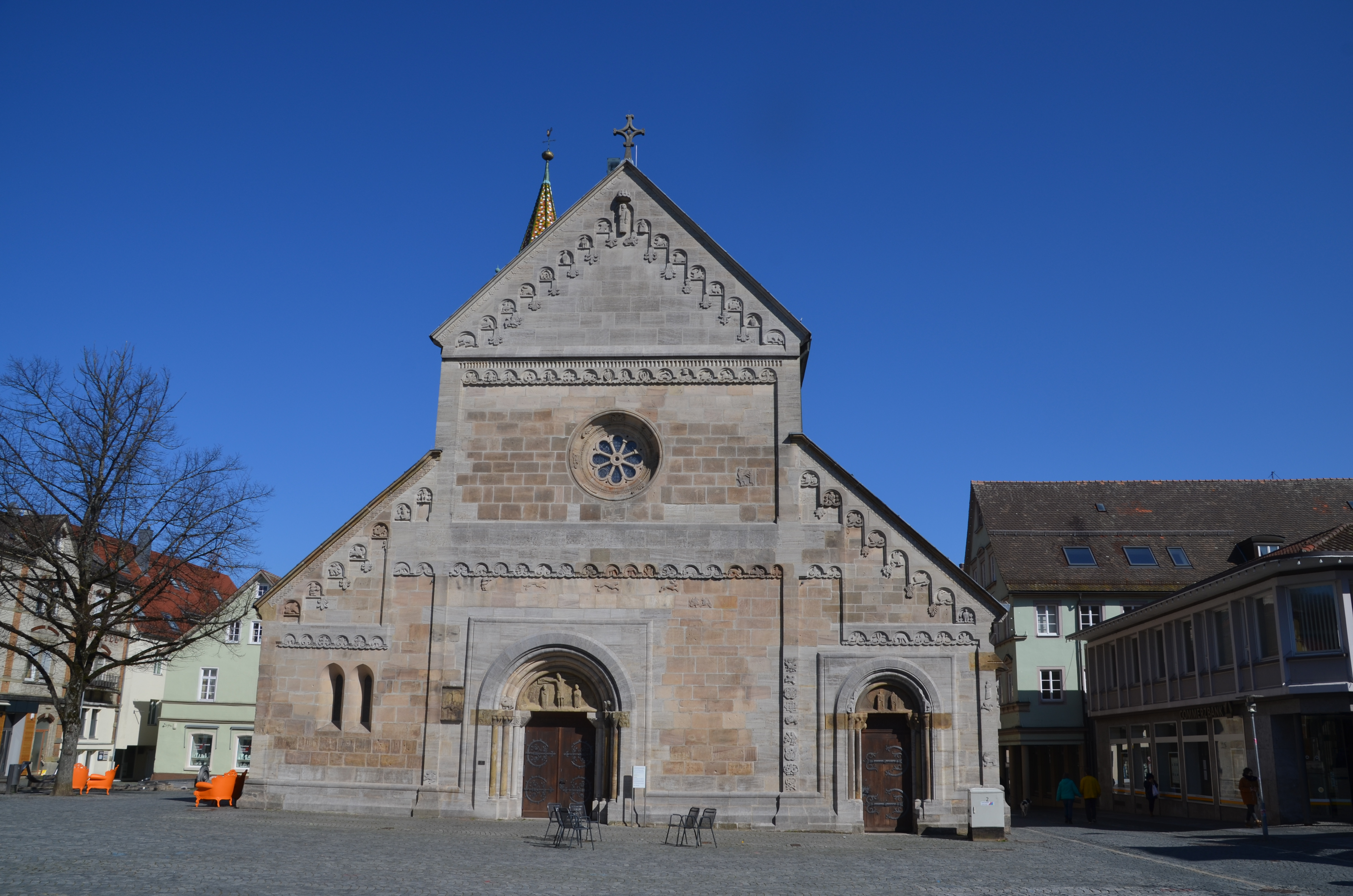 Johanniskirche am Johannisplatz nach der Sanierung